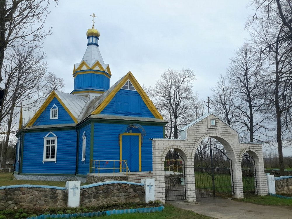 Тумілавічы. Свята-Георгіеўская царква